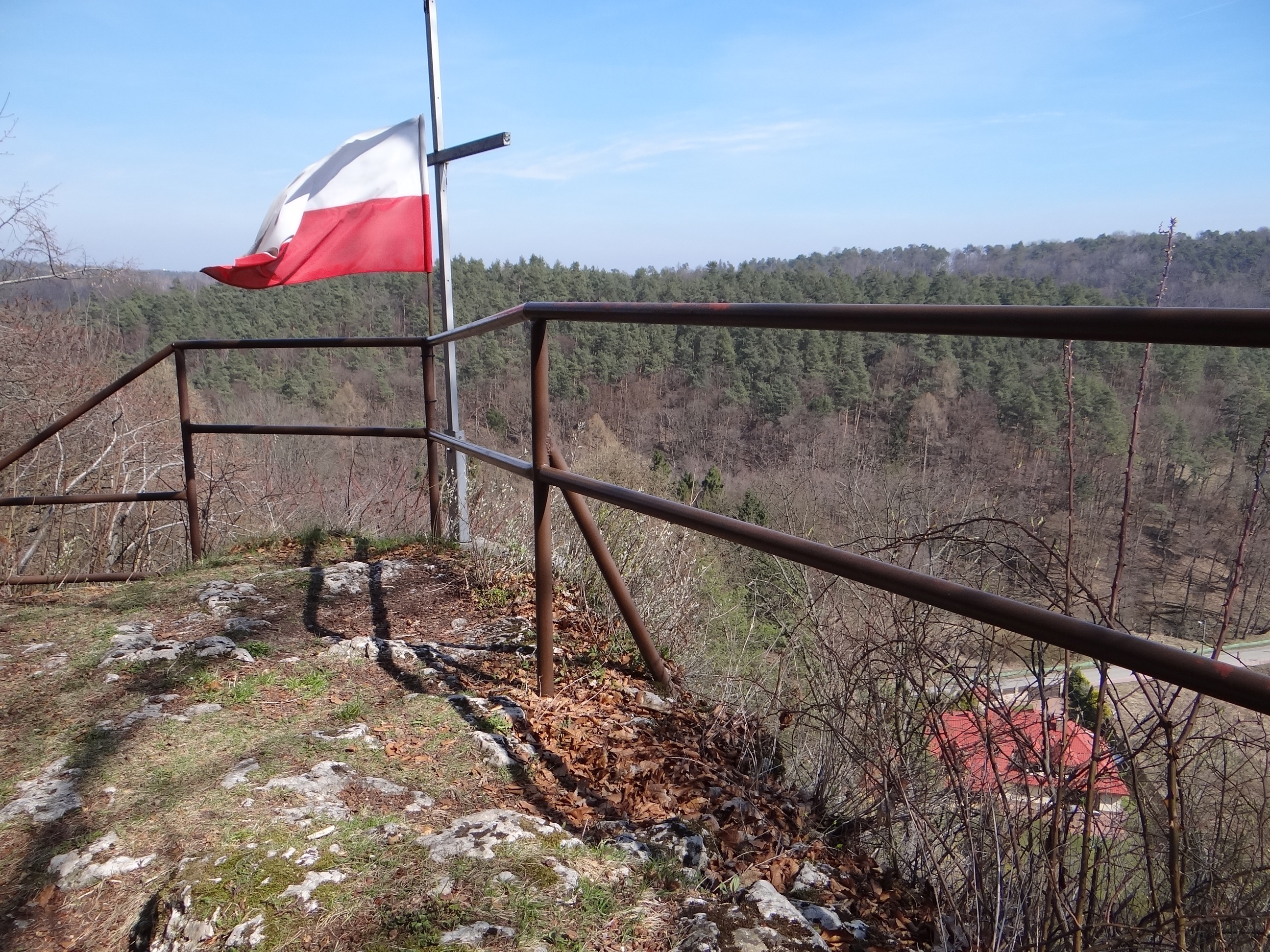 Krzywy Sąd w Aleksandrowicach